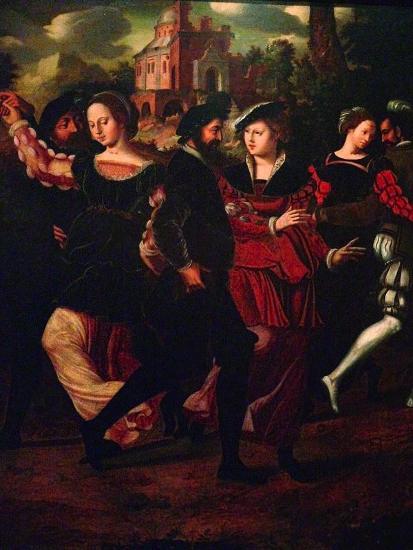 Elegantes parejas bailando en un paisaje, obra de Ambrosius Benson en el Museo de Bellas Artes de la Universidad de Utah (EEUU)